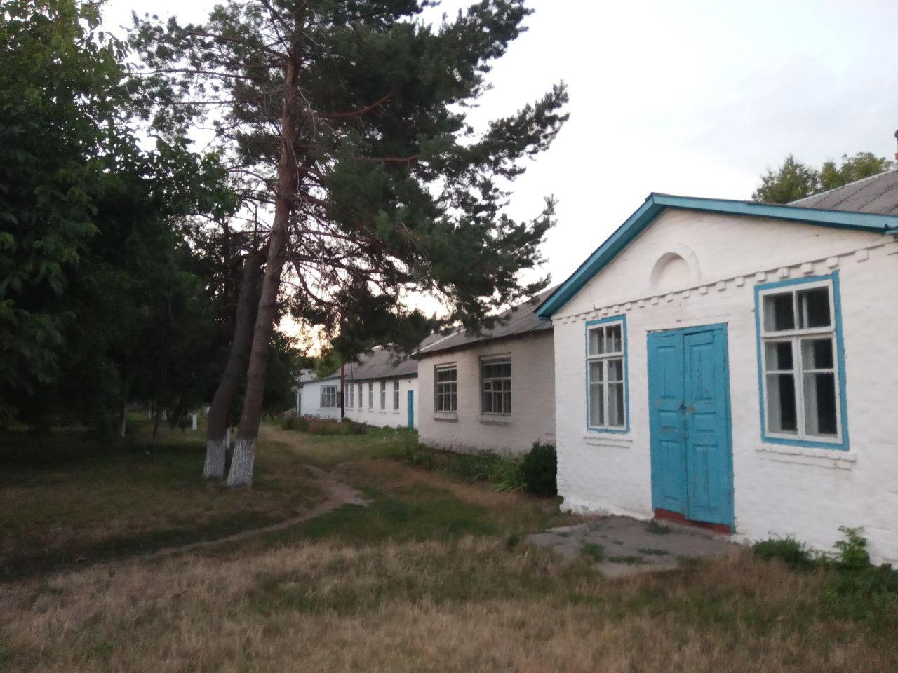 Початкова школа